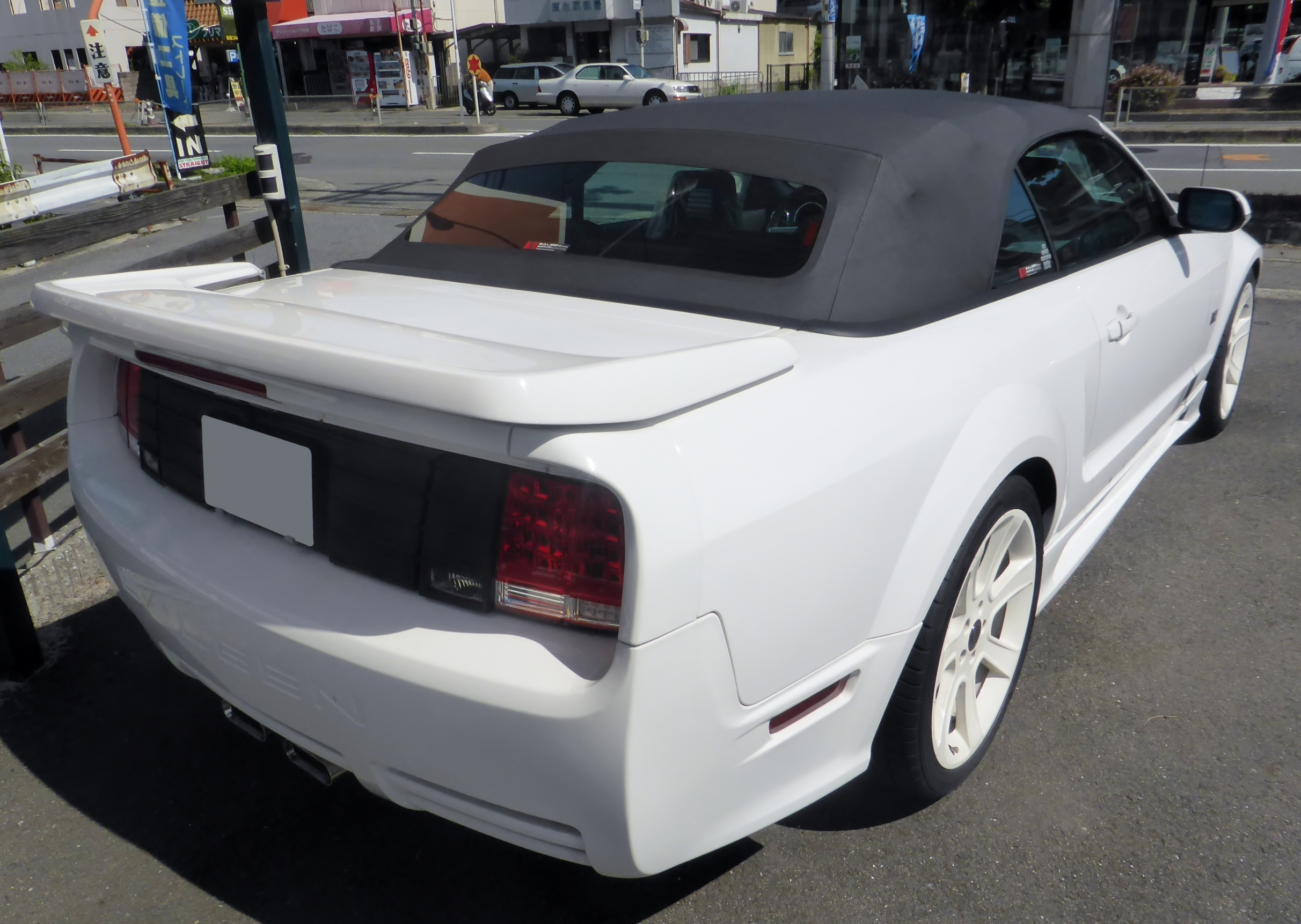 サリーン・S281スーパーチャージャーコンバーチブルをリアから撮影。